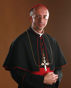 Dom Paulo Roberto Beloto - Bispo da Diocese de Formosa-GO